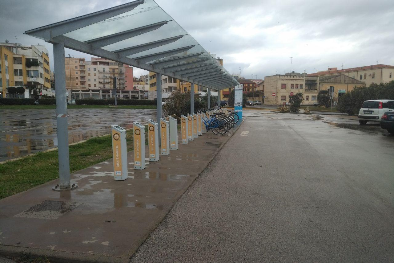 Noleggio bici elettriche situato all'inizio della pista ciclabile.